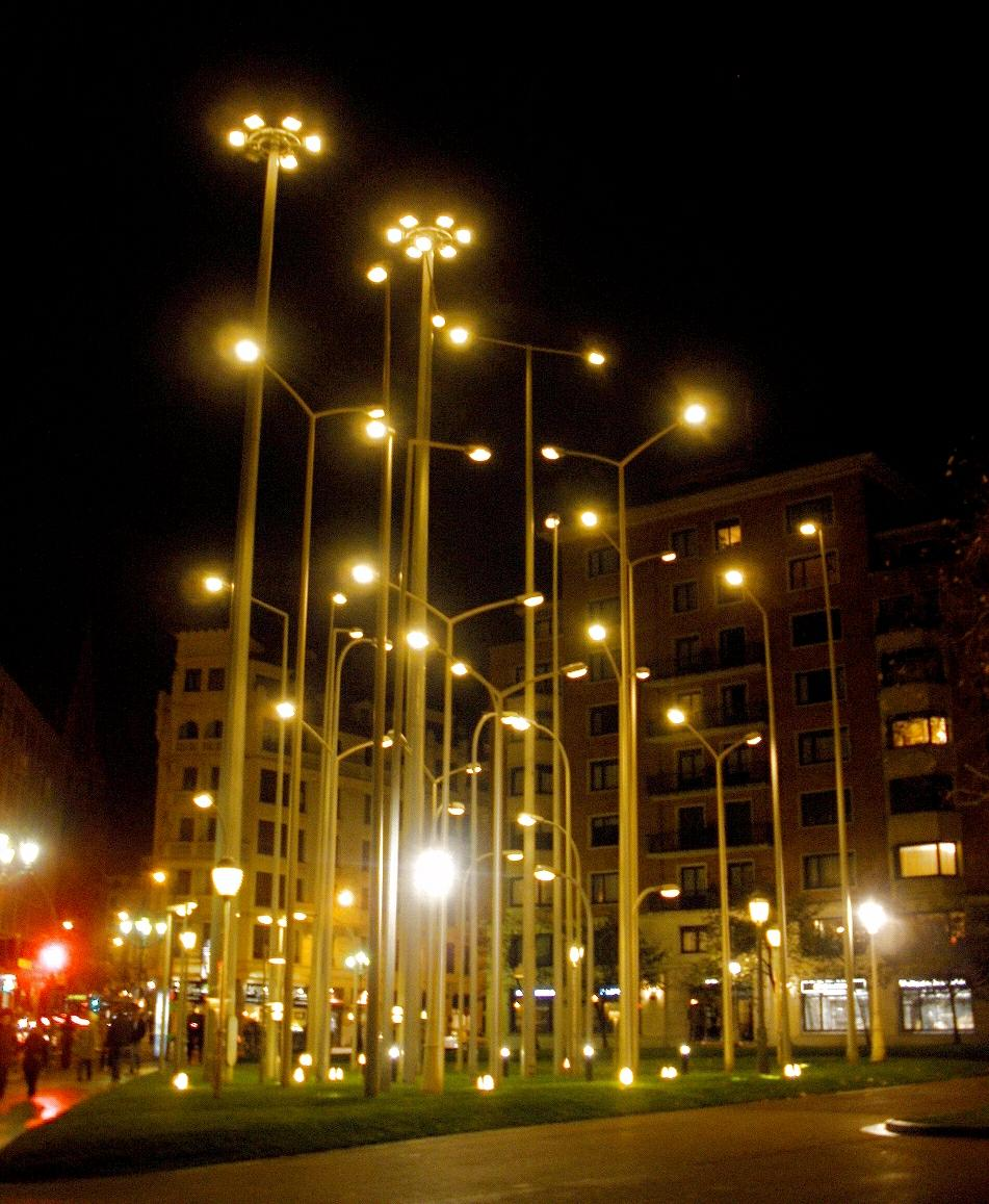 Bosque de Farolas, junto al Museo de Bellas Artes de Bilbao